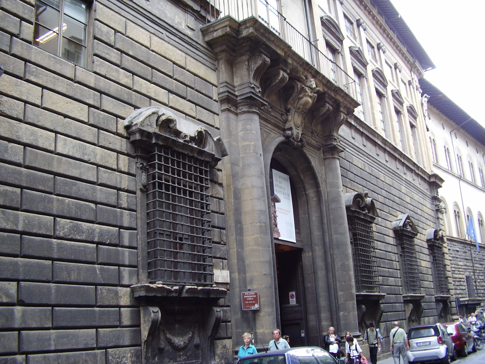 Palazzo Nonfinito, lato su via del Proconsolo. Facade in Florence, Italy